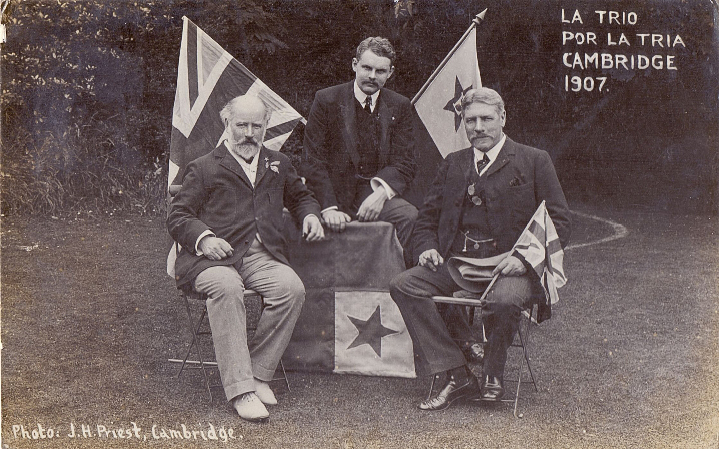 La Trio por la Tria, organizantoj de UK 1907 en Cambridge: George Cunningham, Harold Bolingbroke Mudie kaj John Pollen.